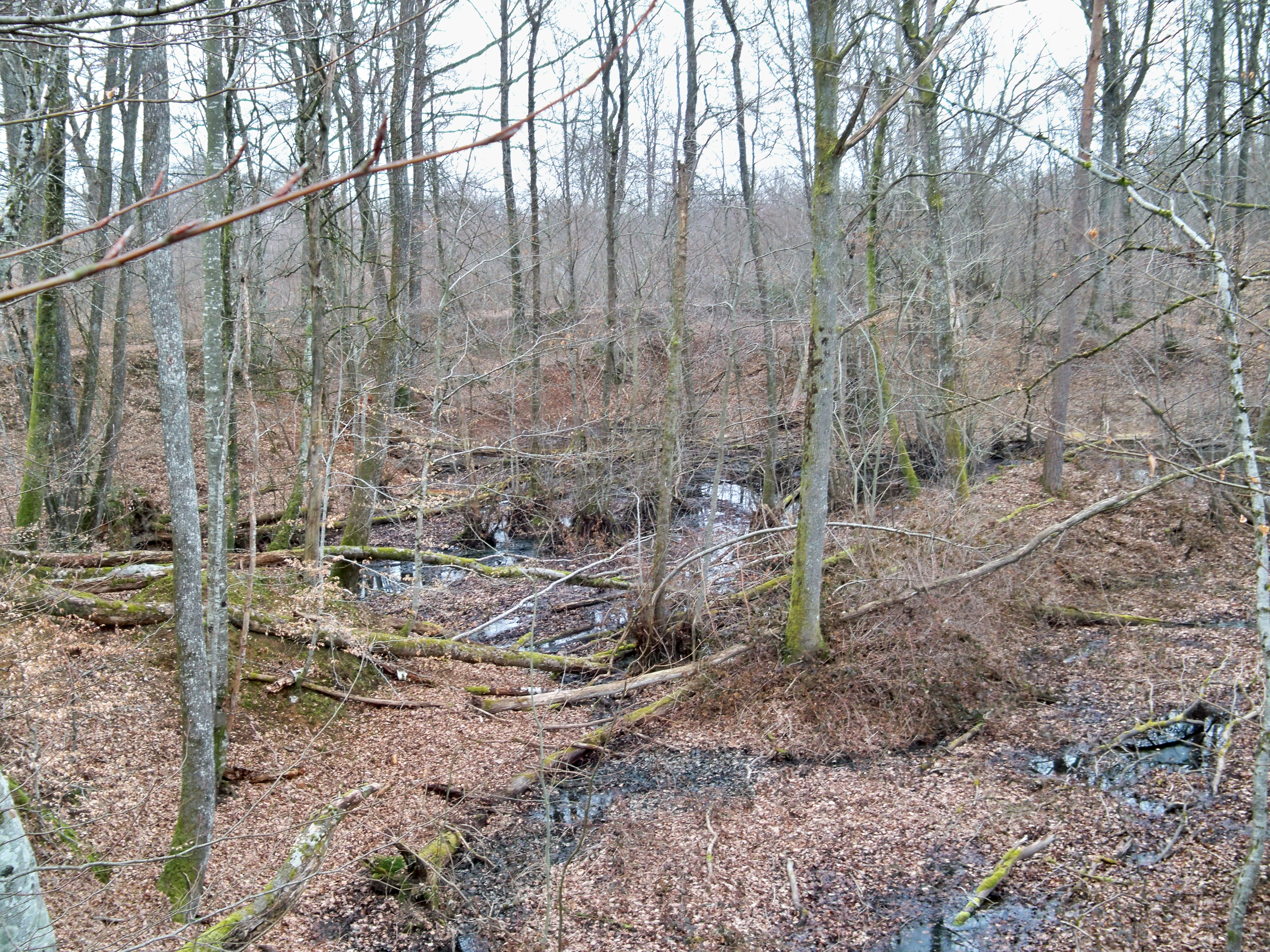 La forêt communale de Maraye-en-Othe, dans le département de l'Aube.